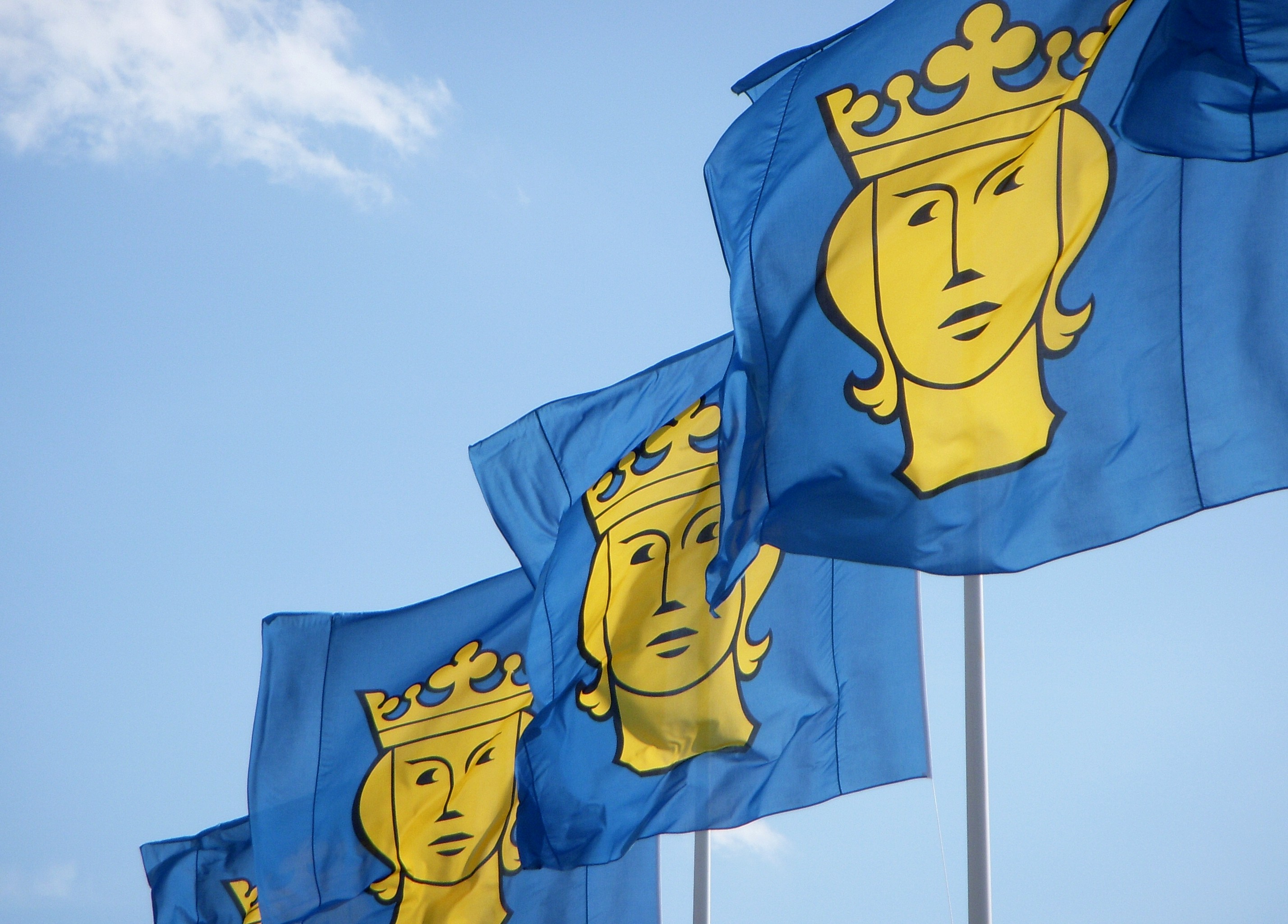 Stockholms vapen, "Sankt Erik"